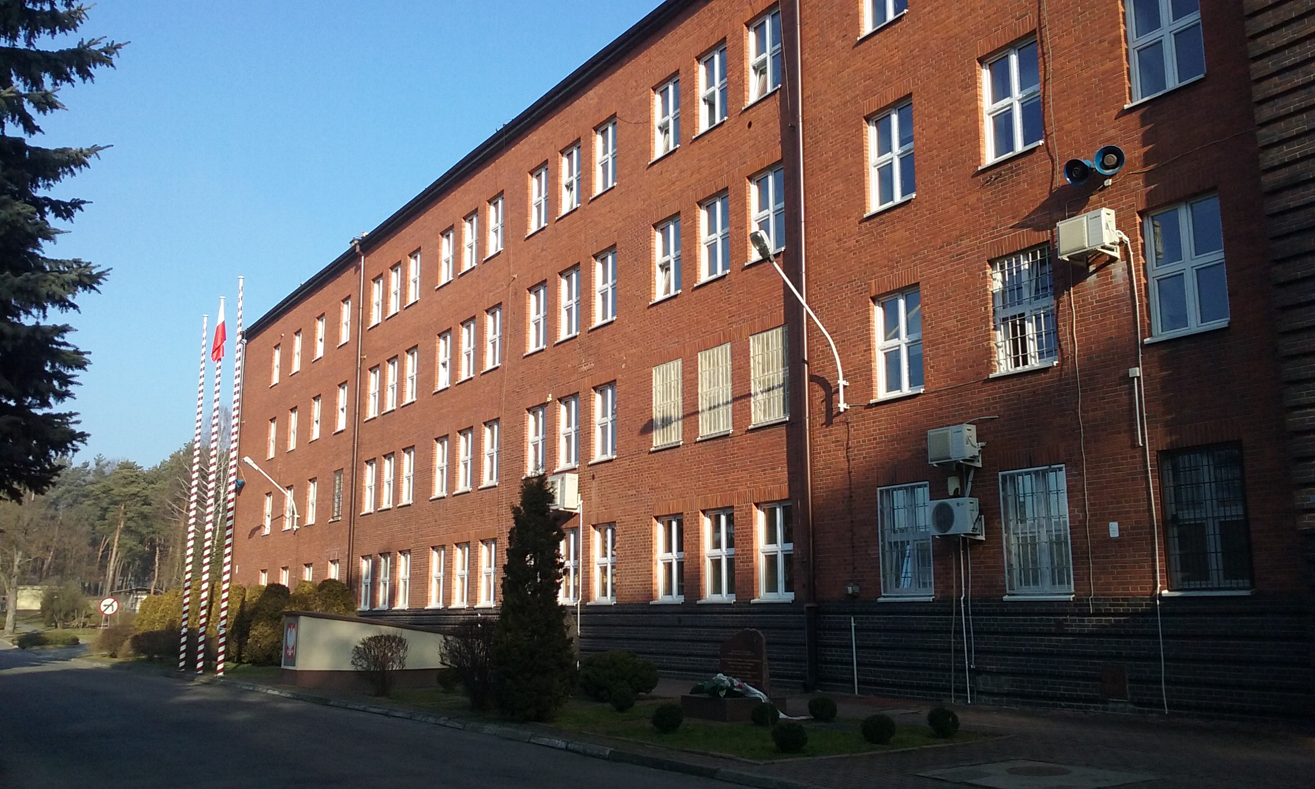 Siedziba sztabu w jednostce w Tomaszowie Mazowieckim